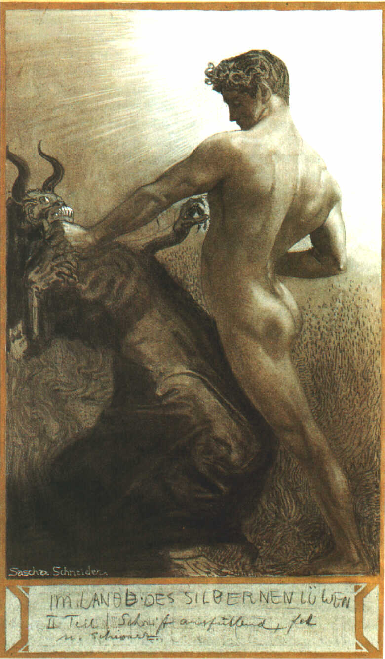 Návrh obálky románu německého spisovatele Karla Maye